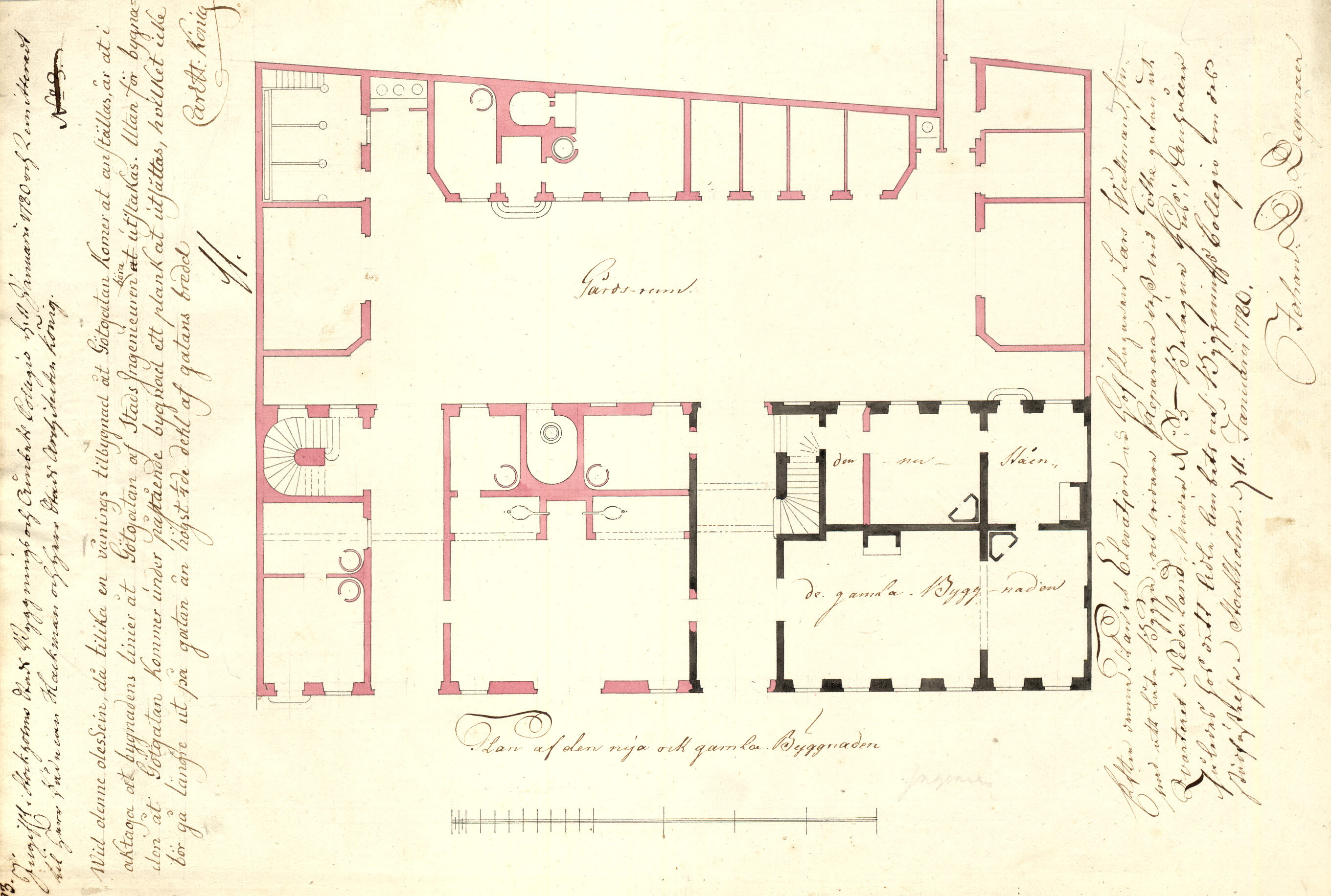 Bygglovsritning till bebyggelsen på "Nederland 20"